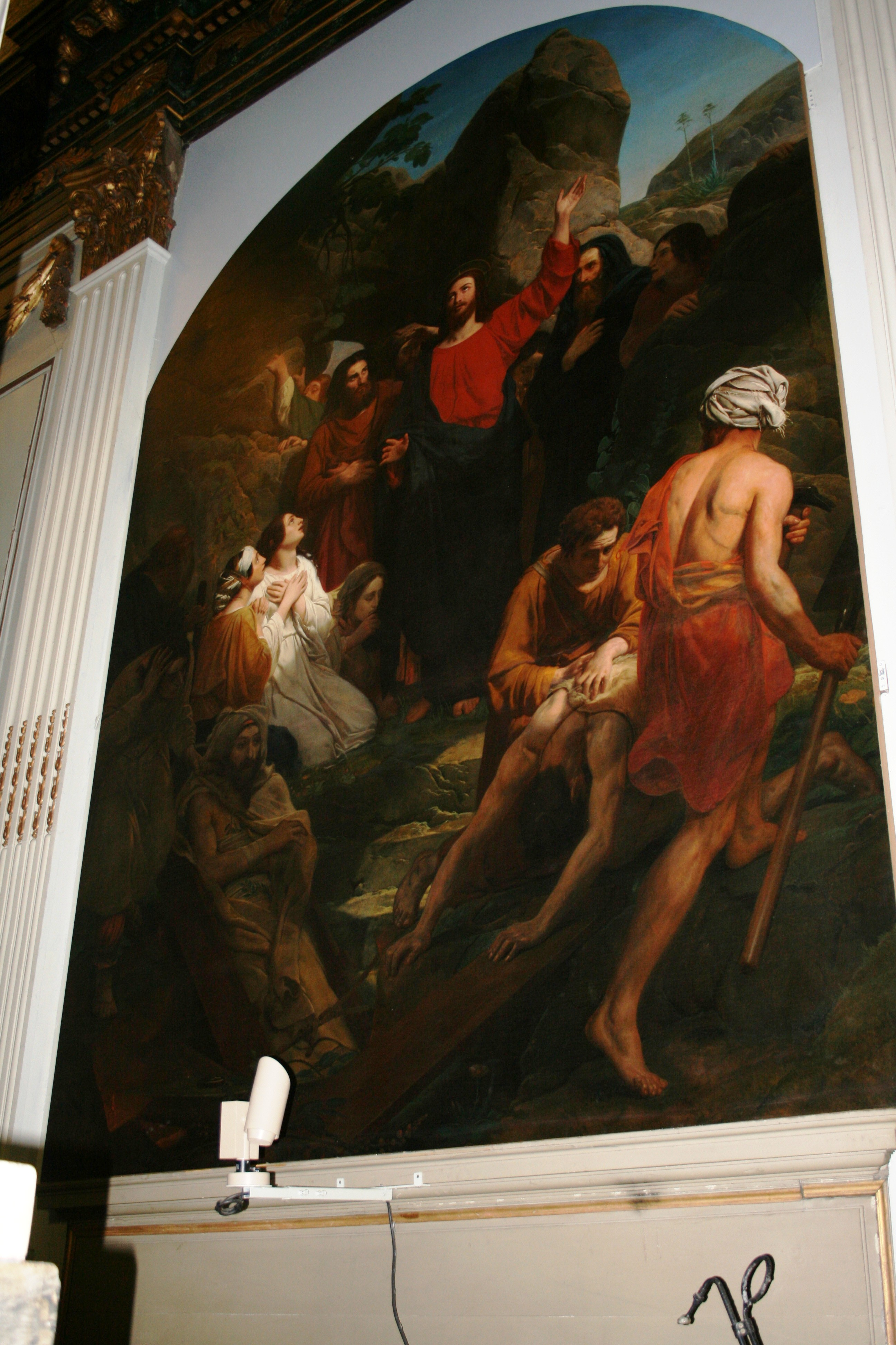 Rennes, église Saint-Germain, tableau du maître-autel, Eloi Firmin Féron (1802-1876), Résurrection de Lazare